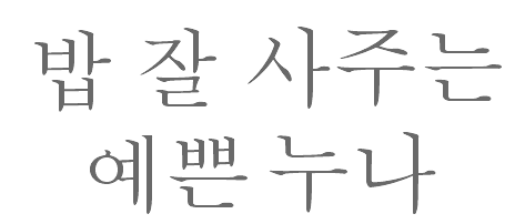 드라마 밥 잘 사주는 예쁜 누나 로고입니다.